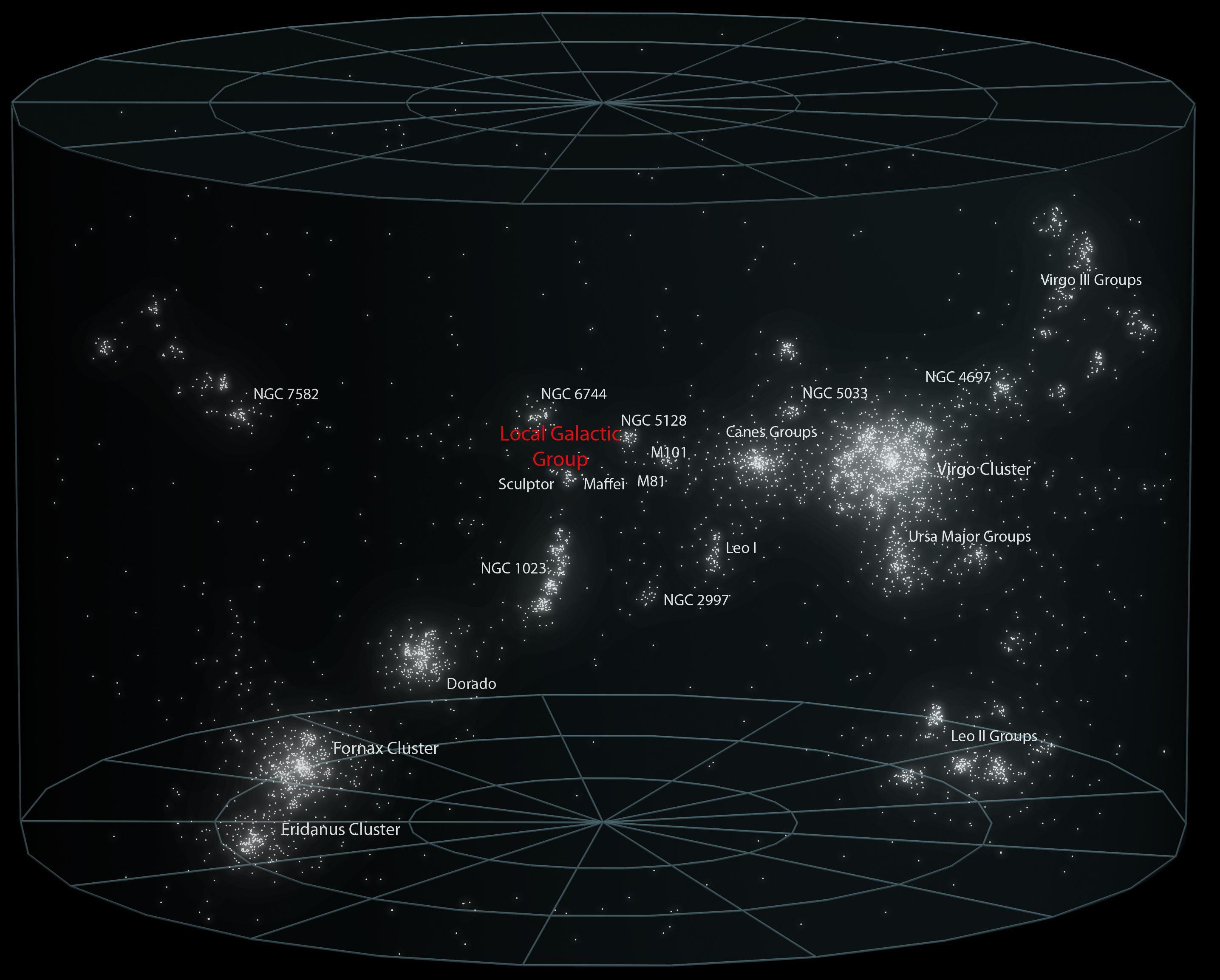 Supercúmulo de Virgo, también conocido como supercúmulo local. en el se encuentran grupos y cúmulos de galaxias, entre ellos el Grupo Local.